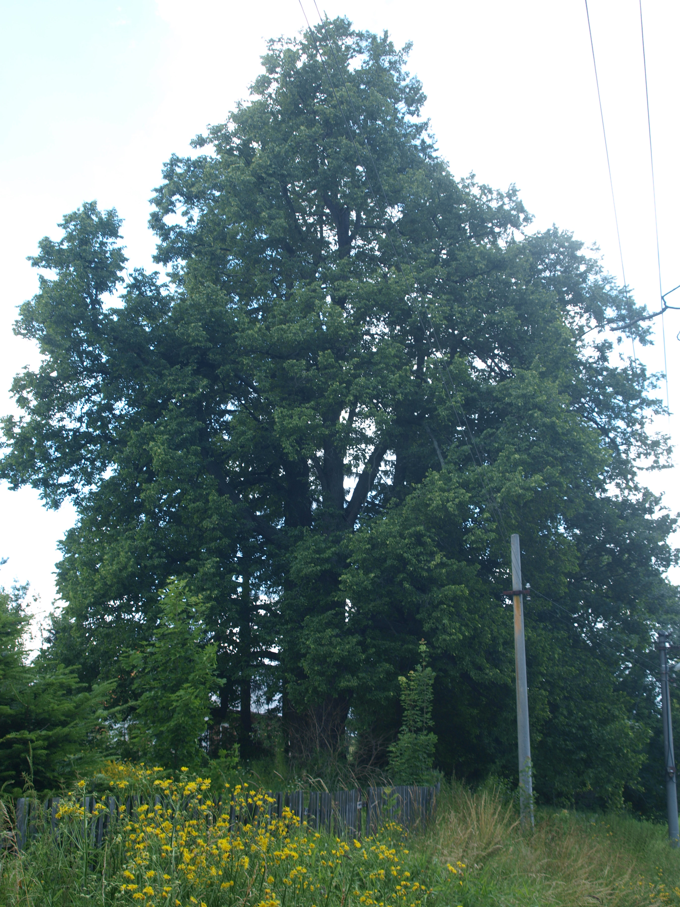 Památný strom Lomnická lípa nacházející se v obci u hlavní silnice, u domu čp. 9.